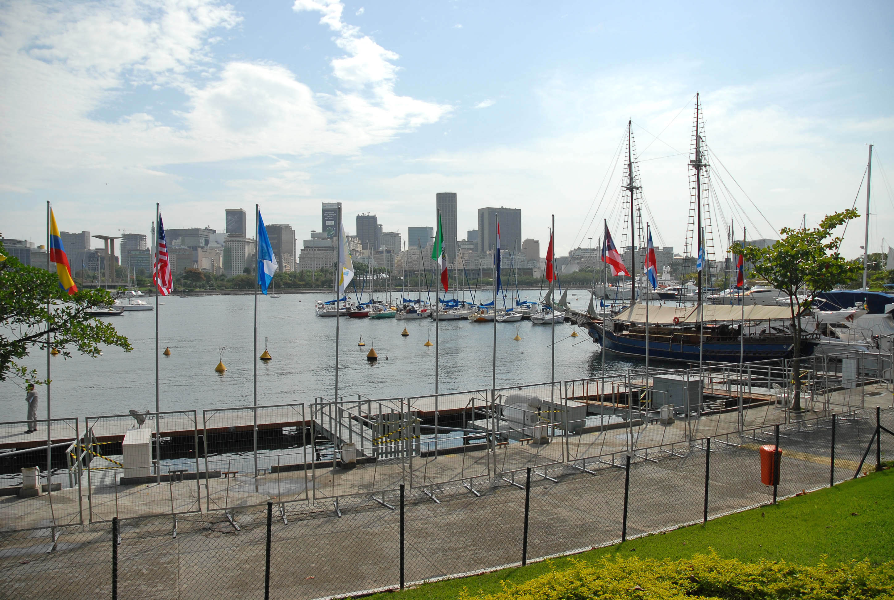 Rio de Janeiro - Marina da Gloria onde foram feitas as competições de vela nos Jogos Pan-Americanos.